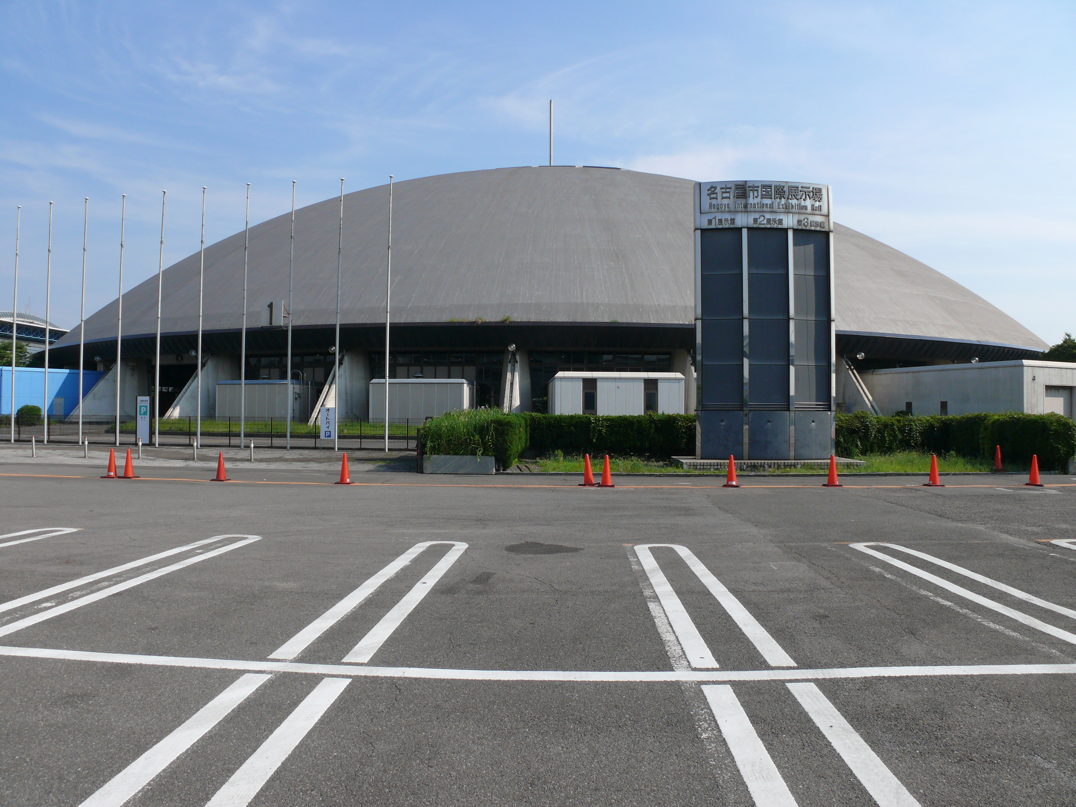 愛知県名古屋市港区にある名古屋市国際展示場（ポートメッセなごや）の第1展示館。Minato Nagoya, Aichi